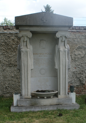 Wiener Zentralfriedhof-Eduard Pötzl